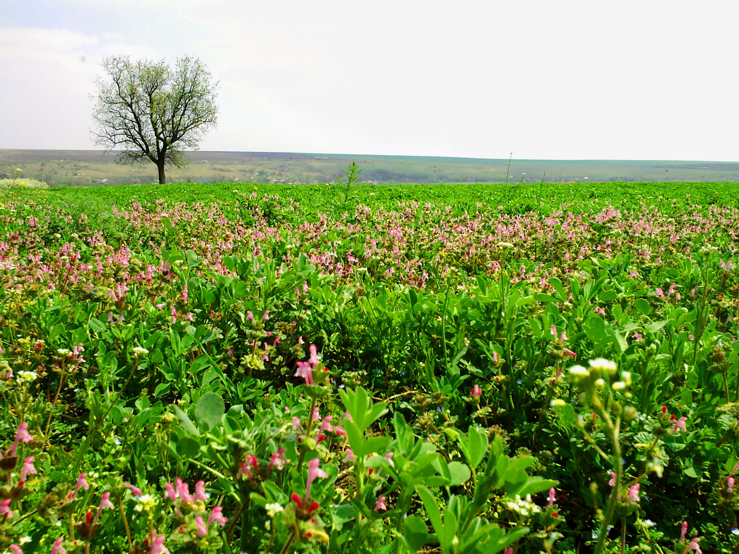 Пейзаж из огорода